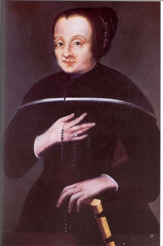 Die Münchner Karmelitin Maria Anna Lindmayr (1657-1726)